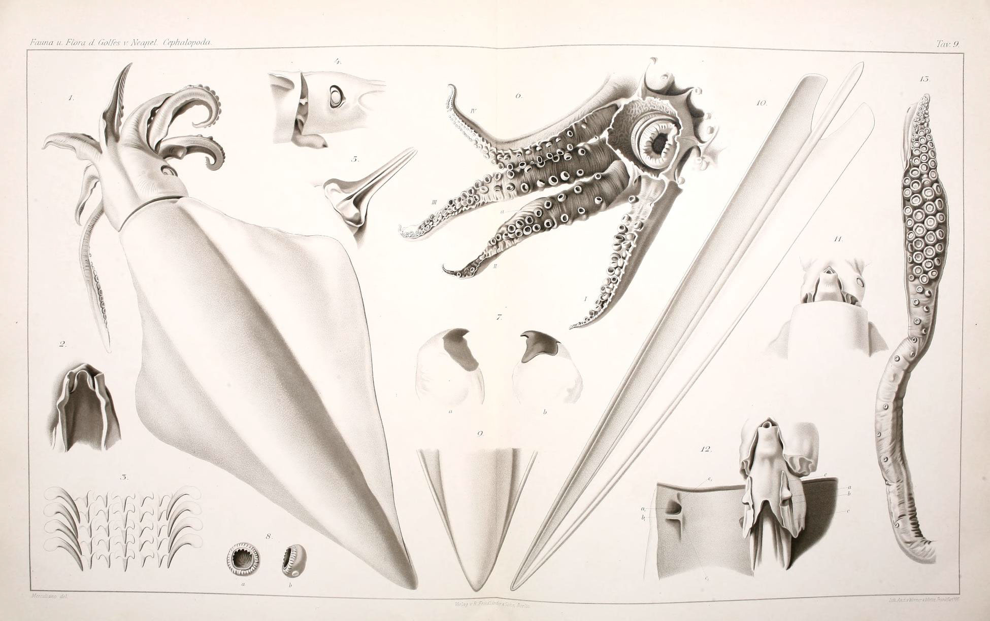 Fauna ii. Flora d. (lolfh v Ncapel. Cephalopodci- Tm: 9. Wf0(r ■/ R Fr.fdl'ùid^rtr.nr^^n '